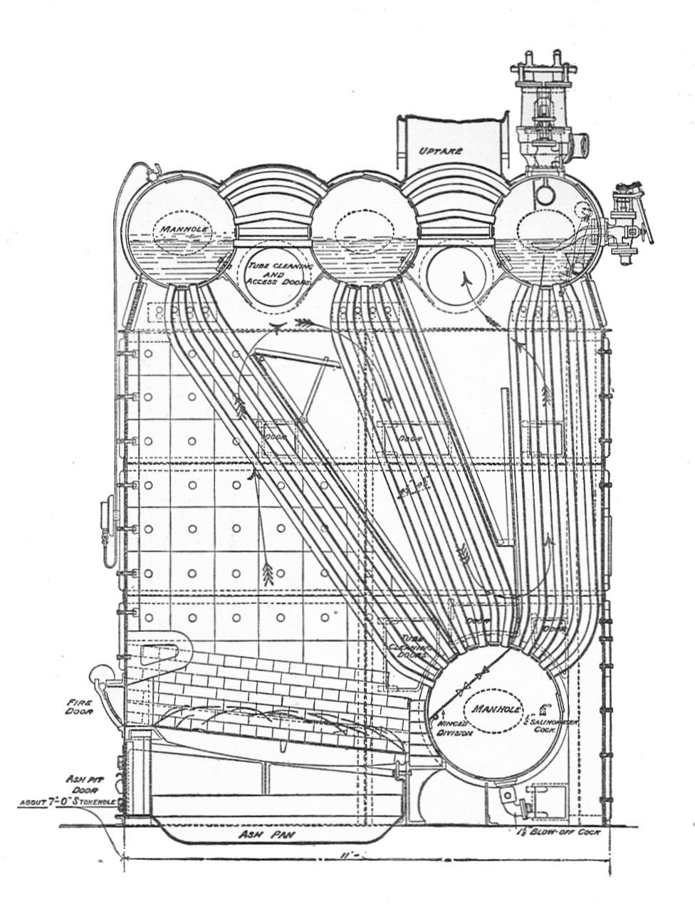 Stirling four-drum watertube boiler (Rankin Kennedy, Modern Engines, Vol VI).jpgFig. 69